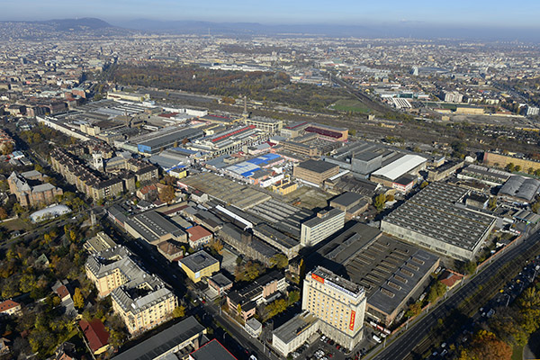 Budapest VIII. kerületének egy részlete madártávlatból.